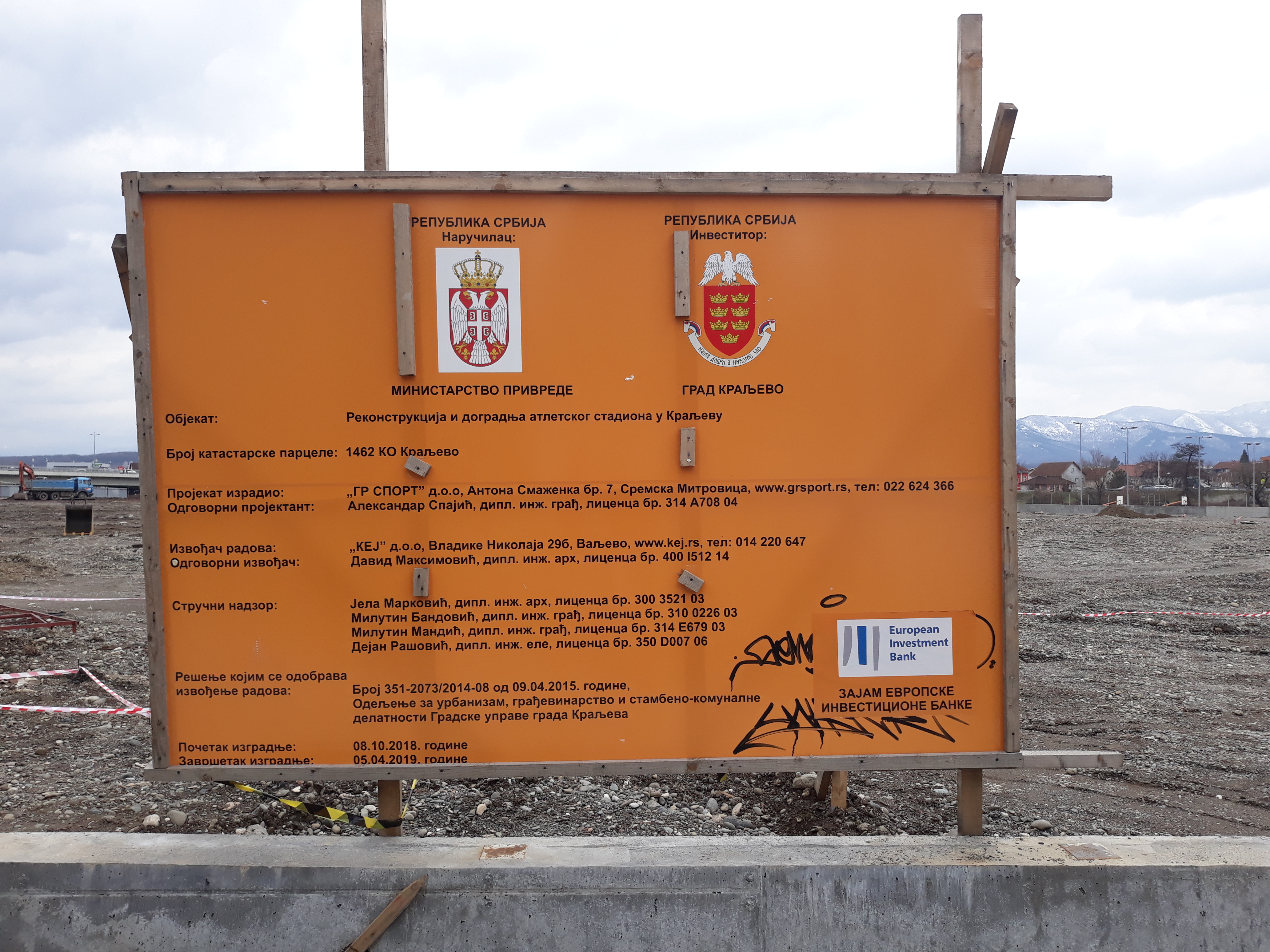 Реконструкција Атлетског стадиона у Краљеву